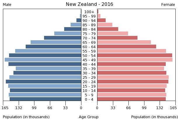 A population pyramid illustrates the age and sex structure of a country's population and may provide insights about political and social stability, as well as economic development. The population is distributed along the horizontal axis, with males shown on the left and females on the right. The male and female populations are broken down into 5-year age groups represented as horizontal bars along the vertical axis, with the youngest age groups at the bottom and the oldest at the top. The shape of the population pyramid gradually evolves over time based on fertility, mortality, and international migration trends.